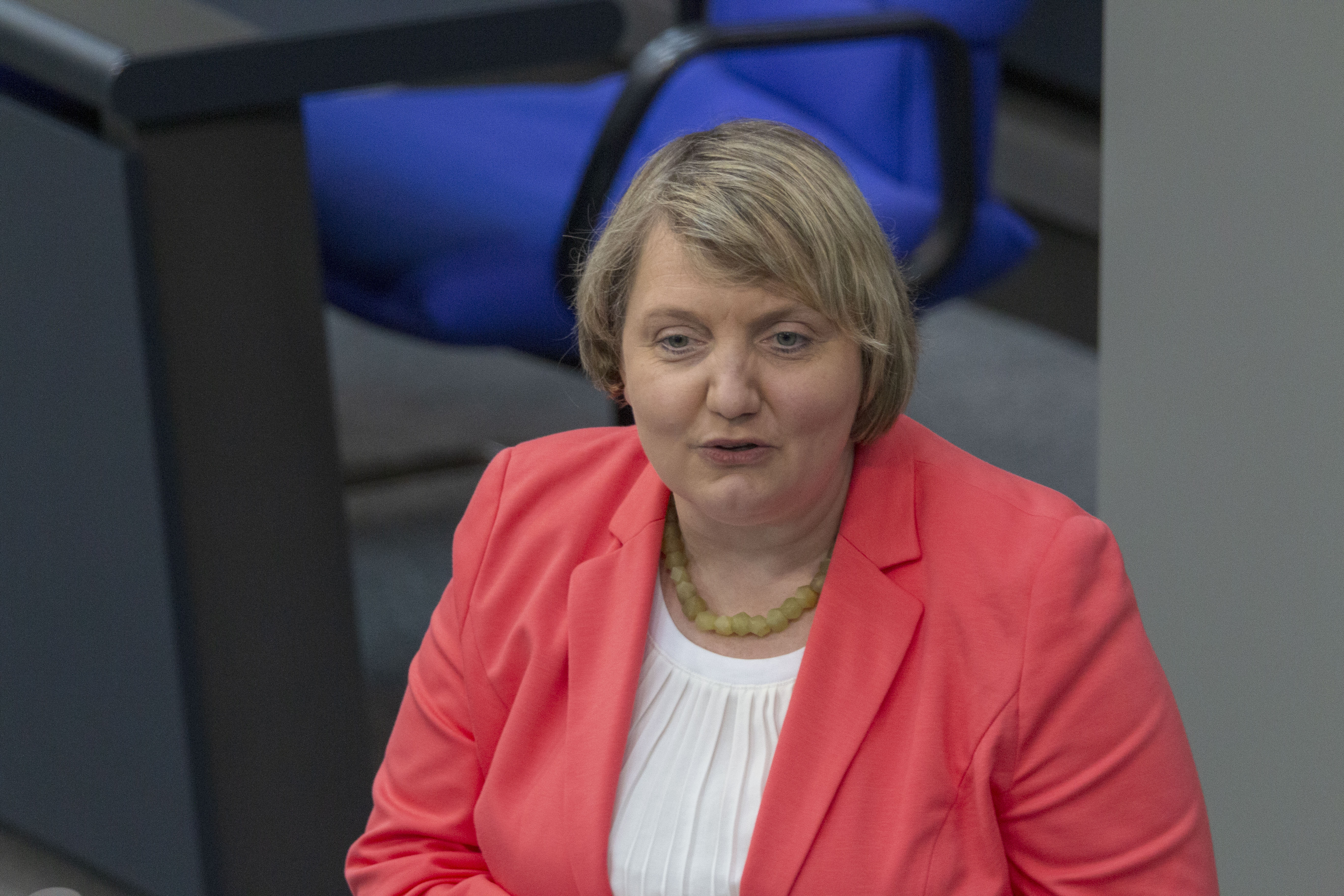 Katja Mast während einer Plenarsitzung des Deutschen Bundestages am 2. Juli 2020 in Berlin.